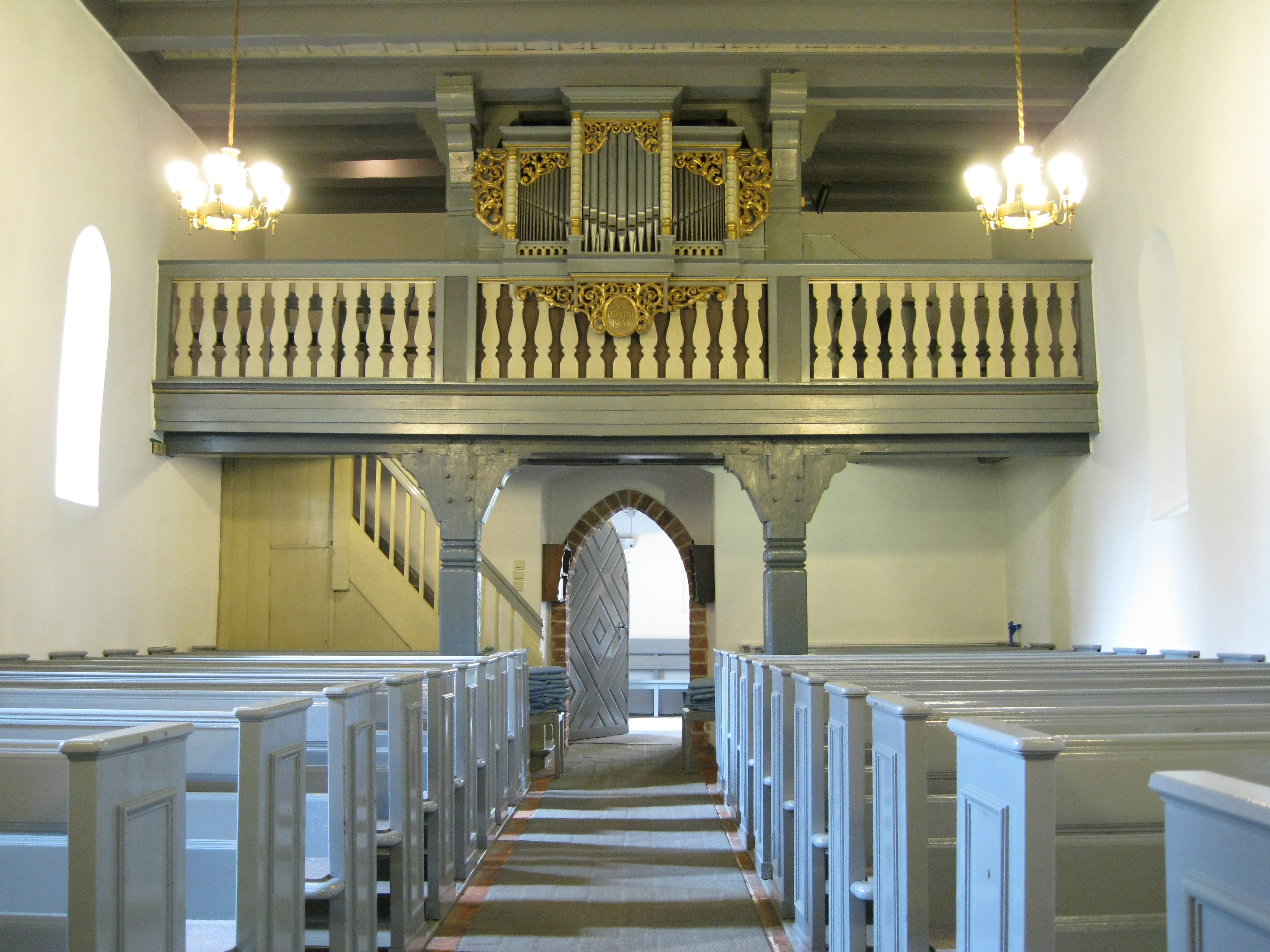 Dorfkirche Lichterfelde, Blick Richtung Westen auf die Orgelempore